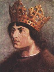 Aleksander wg. Jana Matejki.